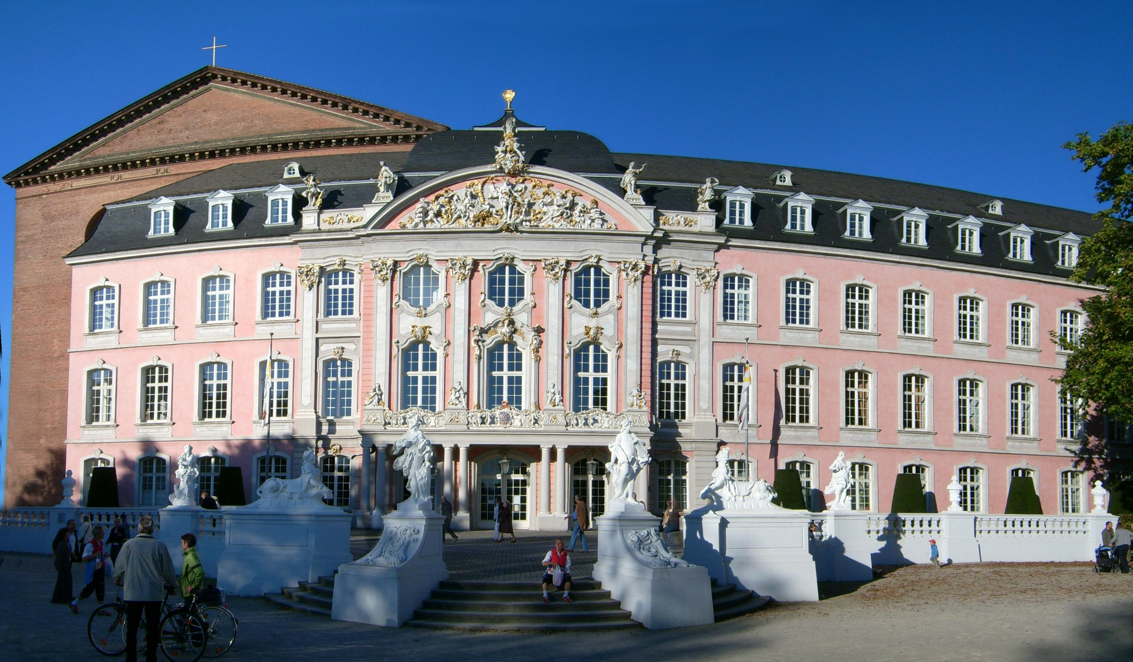 Electoral in Trier